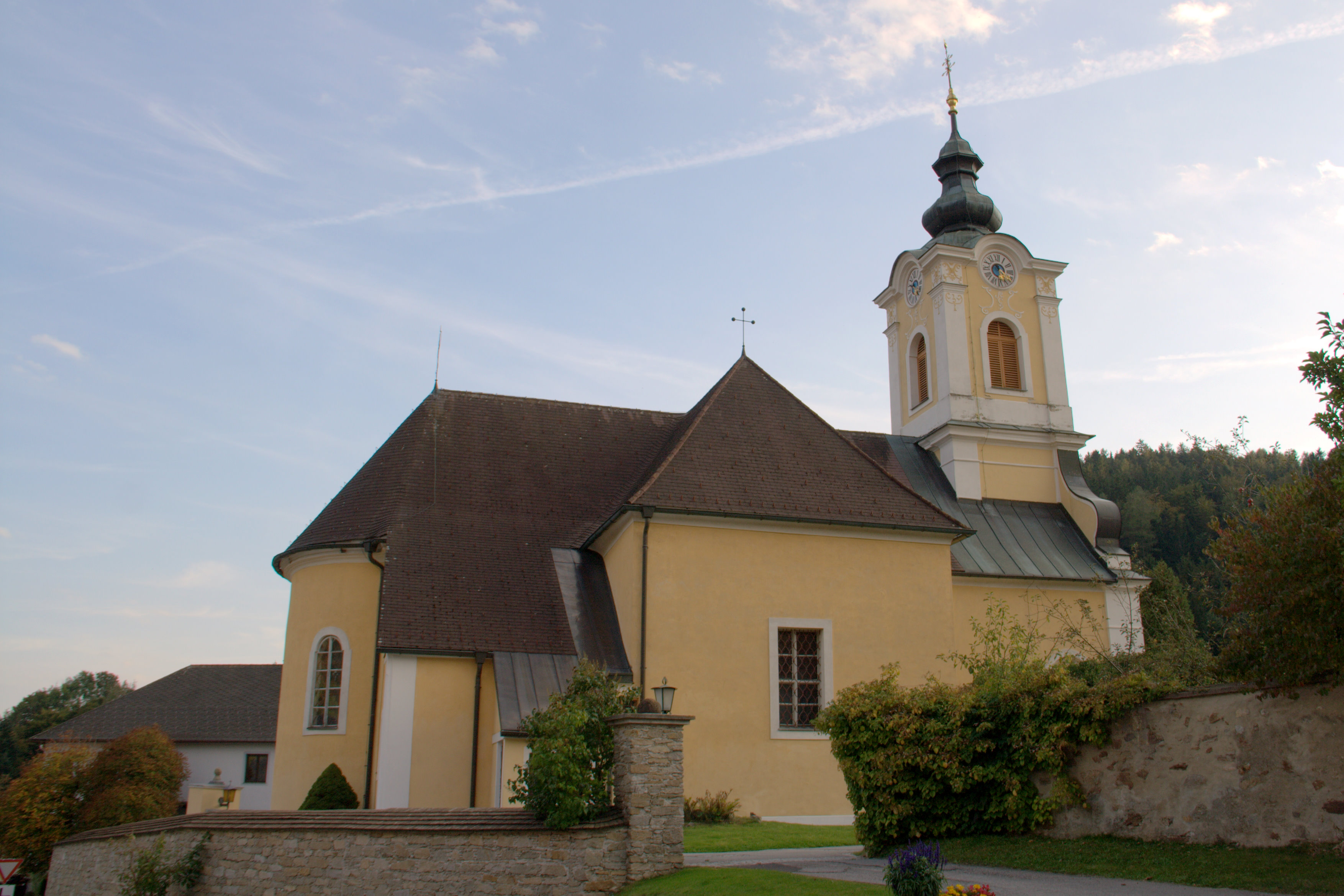 Kath. Pfarrkirche hll. Peter und Paul und Kirchhofmauer